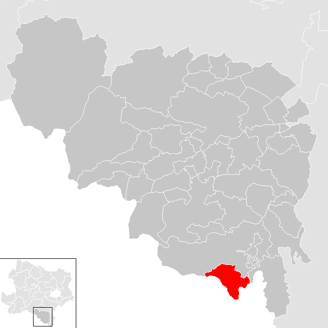 Bezirk Neunkirchen